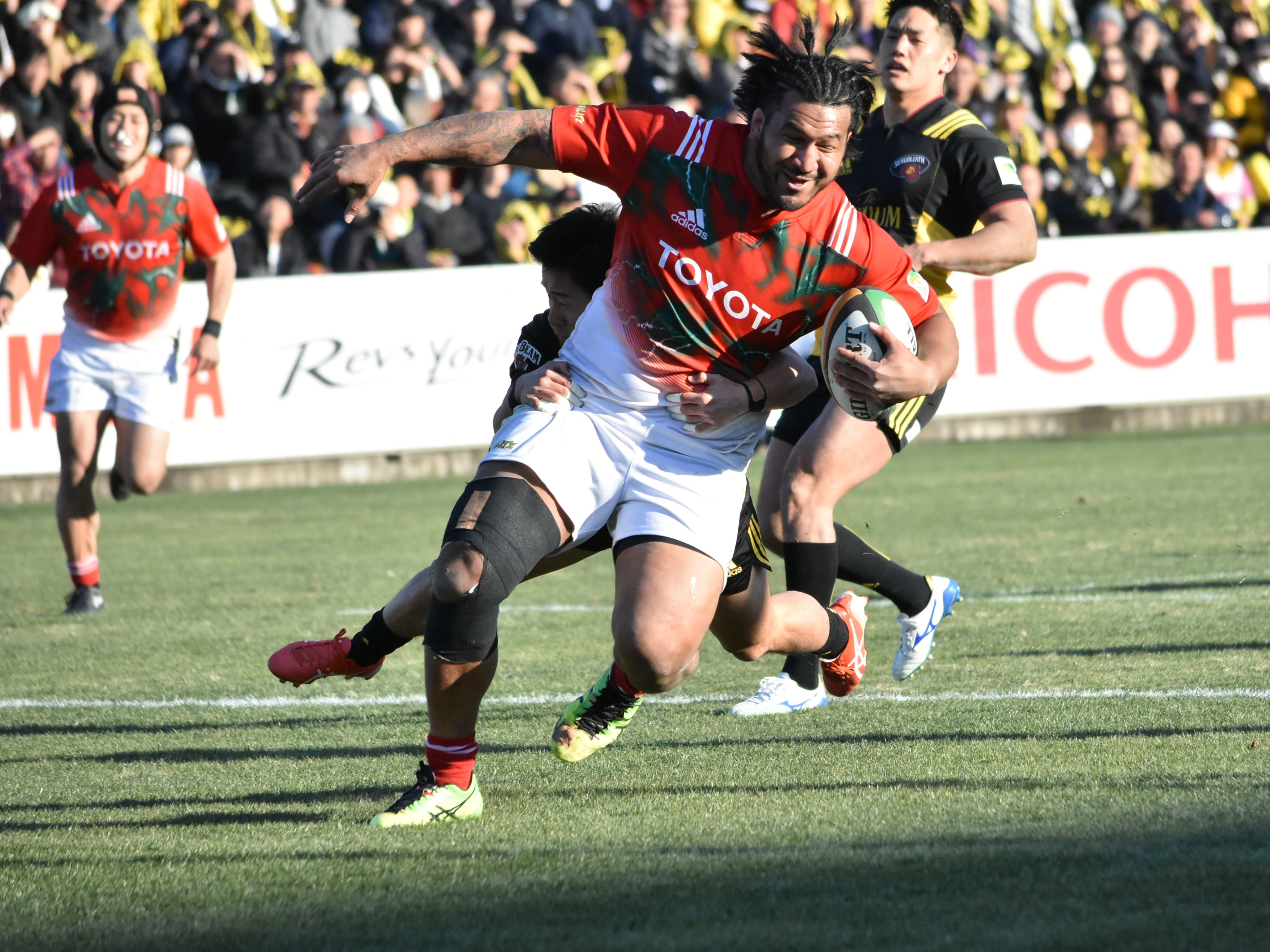 フェツアニ・ラウタイミ